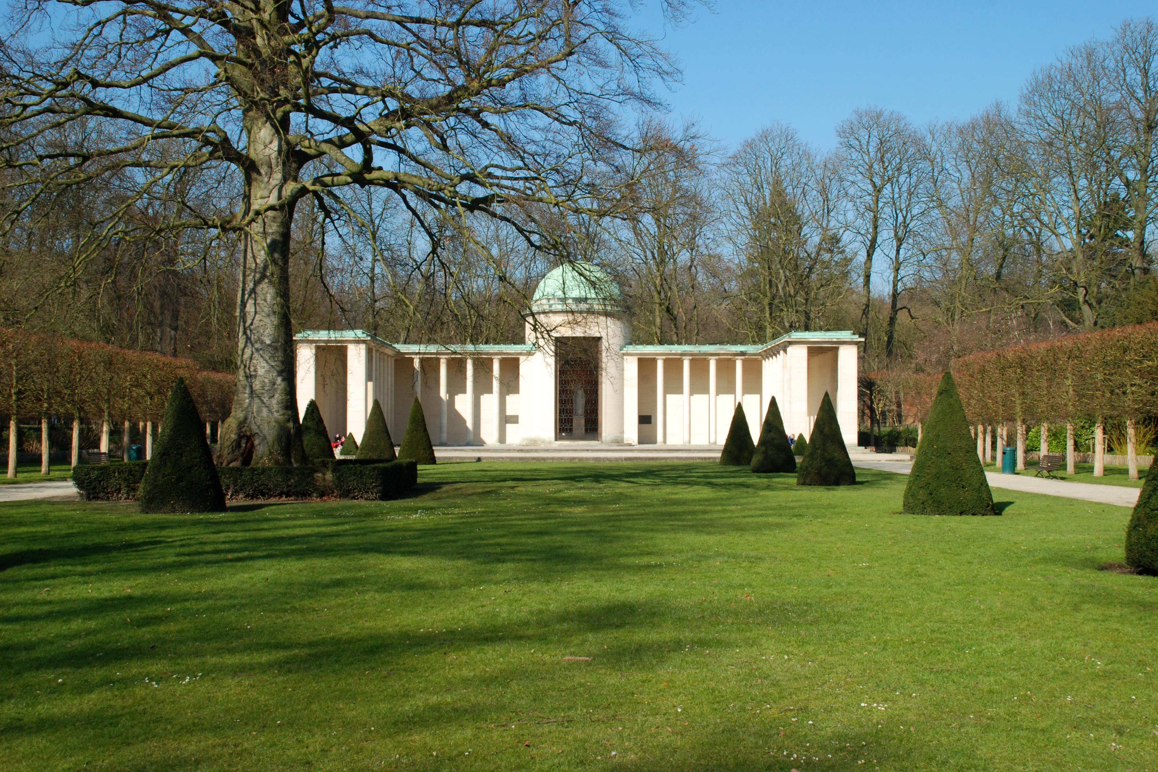 Belgique - Bruxelles - Mausolée Reine Astrid (Architecture monumentale - architecte Paul Bonduelle - 1938)